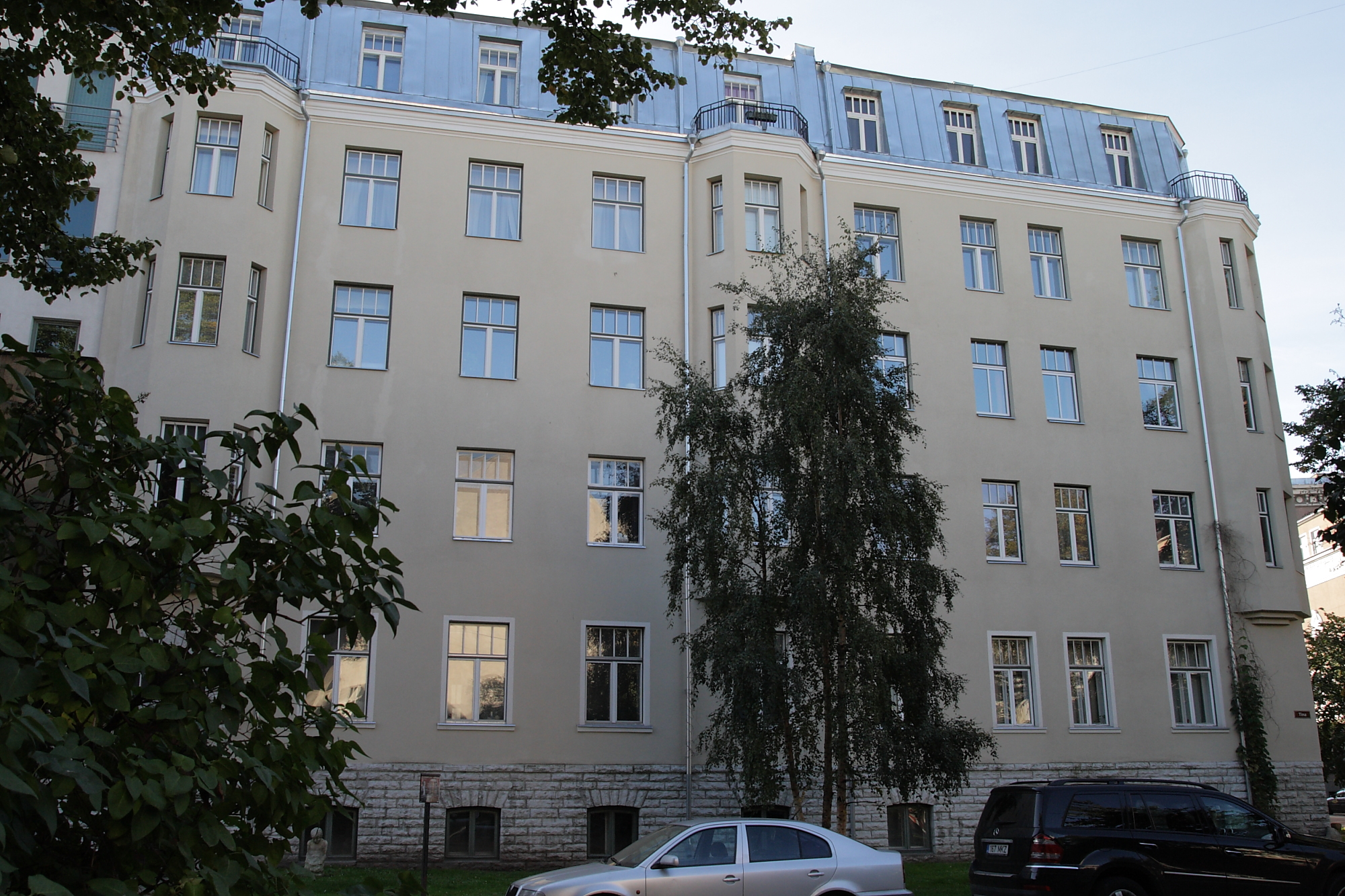 Tallinn, maja, kus aastail 1938-1970 elas Andres Särev ja 1920-1930 Jaan Soots